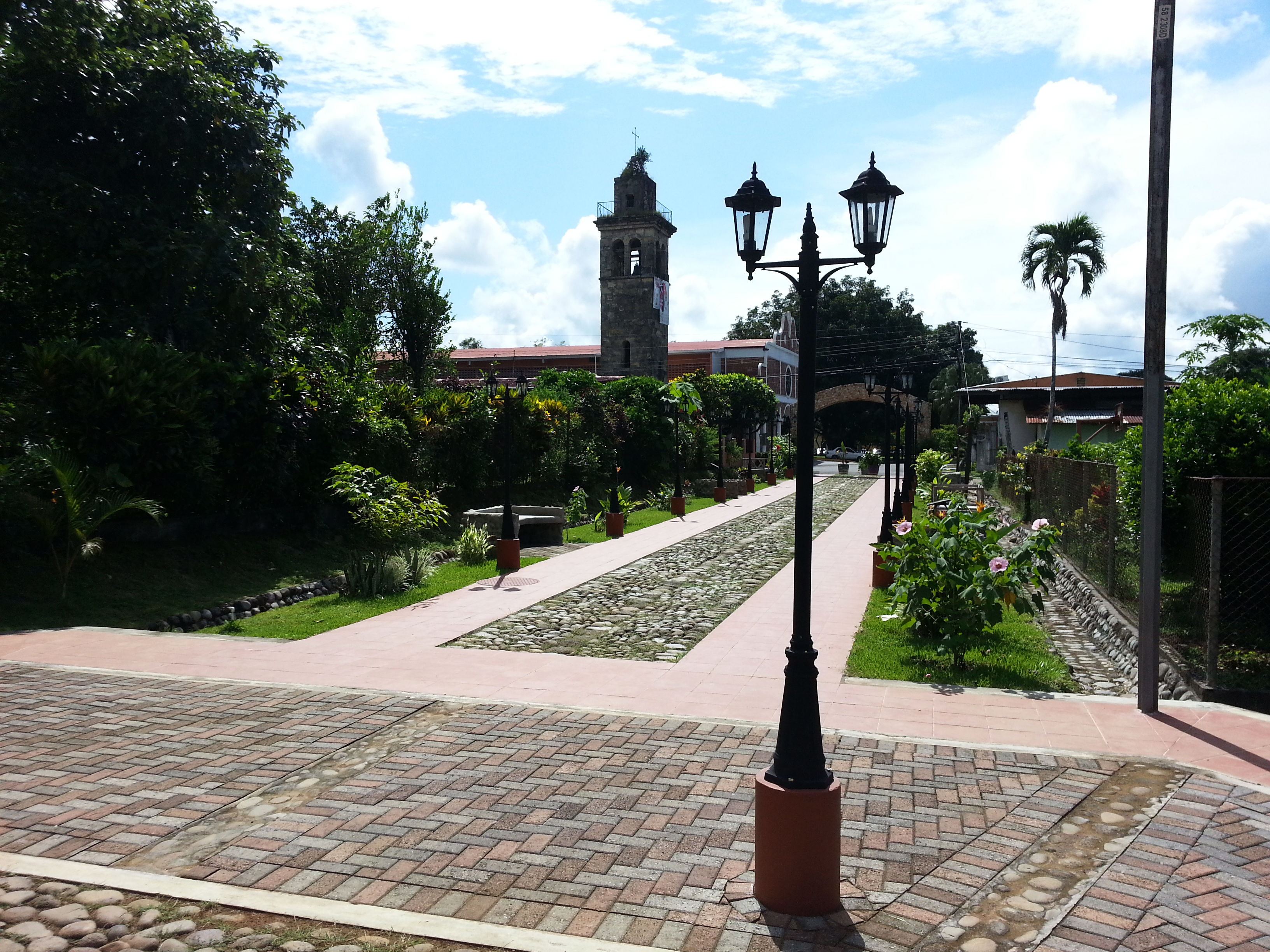 La Torre externa de la Catedral de San José de David. Foto tomada desde el camino "Tardes de Antaño y Sombrero" que lleva directo ala catedral.Forman Parte del Casco Antiguo de David, Ubicado en el Barrio Bolivar.